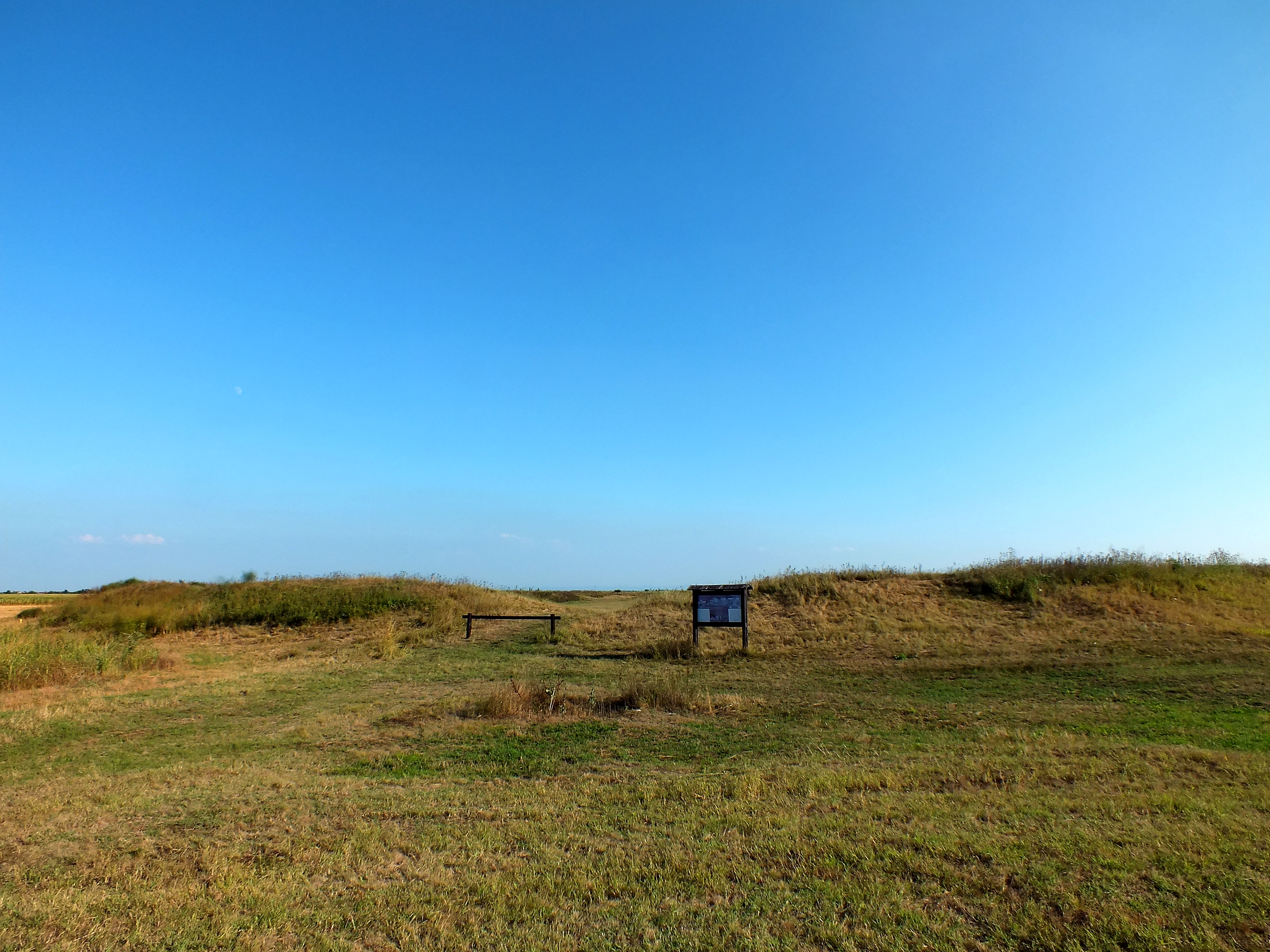 "...На око 1,5 km од пута између Врбаса и Бачког Доброг Поља налази се земљано утврђење елипсоидног облика димензије 190 x120m познато под називом "Чарнок". Овакав тип утврђења карактеристичан је за Подунавље у 1. веку пне., а намена му је искључиво одбрамбрена. У књизи Фридриха Лоца се наводи да је пронађен кружни шанац који су имали Авари око својих утврђења и он закључује да су овај терен касније, у 6. веку насељавали Авари и Словени (после продора Хуна)...."